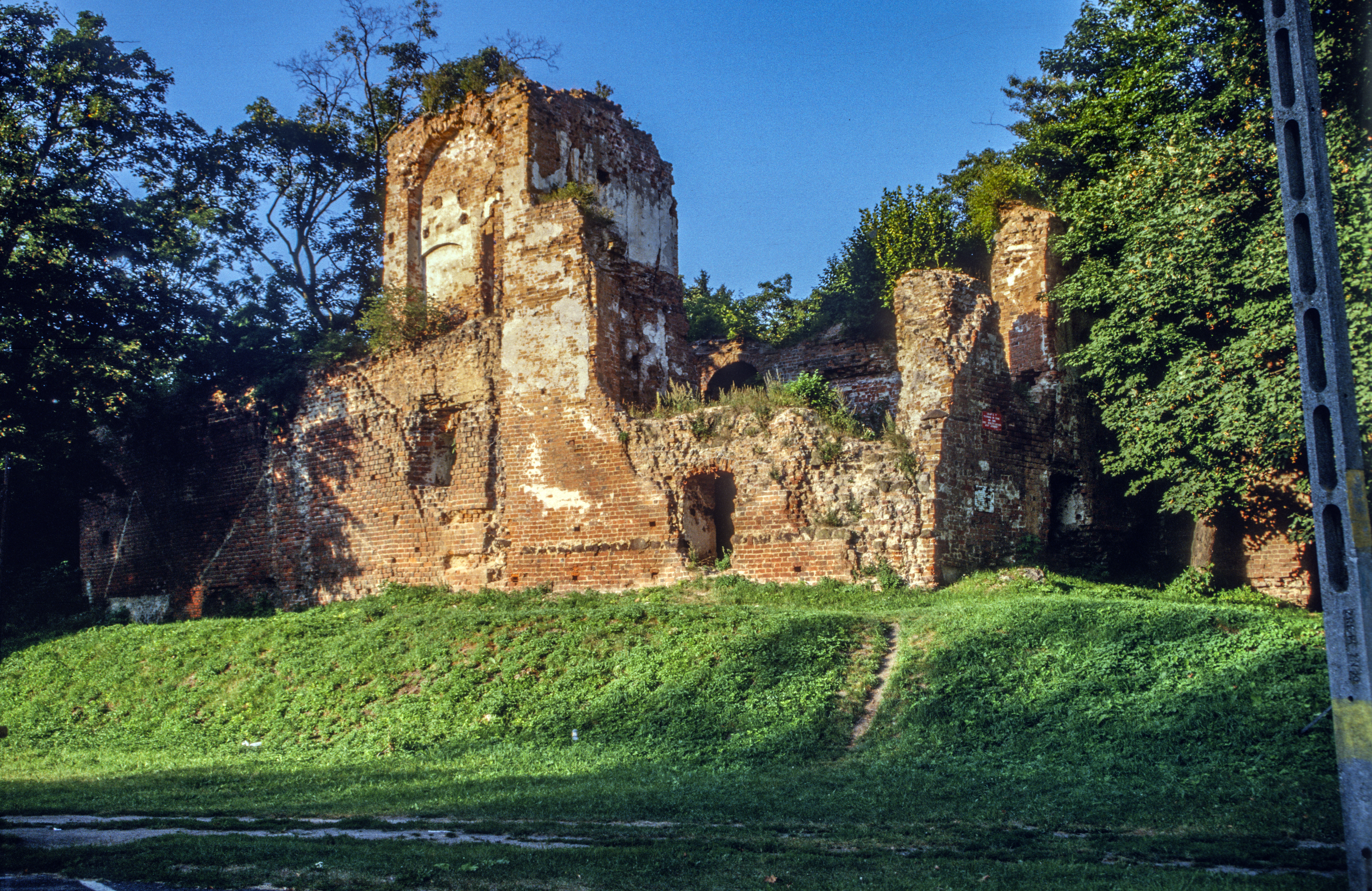 Milicz